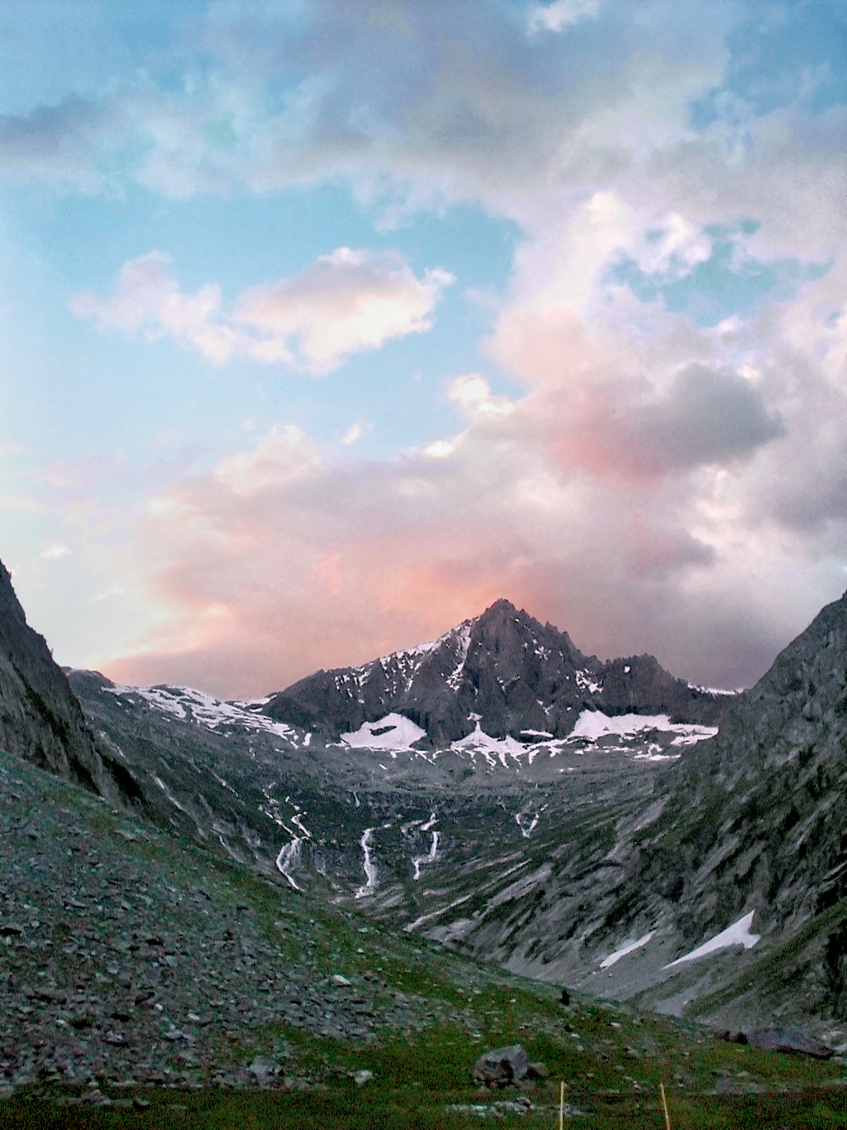 Bietschhorn von der 14,44 km entfernt liegenden Alpe „Nasse Pletscha“ (46°15'39.9" N, 7°50'10.1" O) aus gesehen.